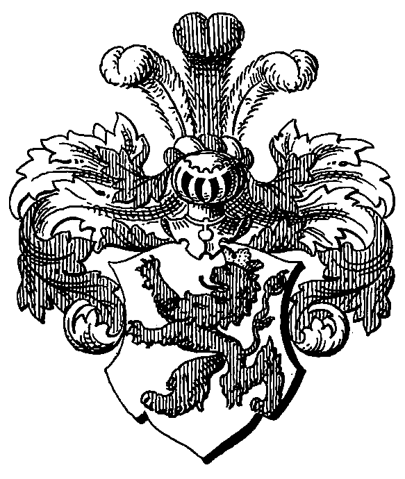 Stammwappen der von Bernewitz